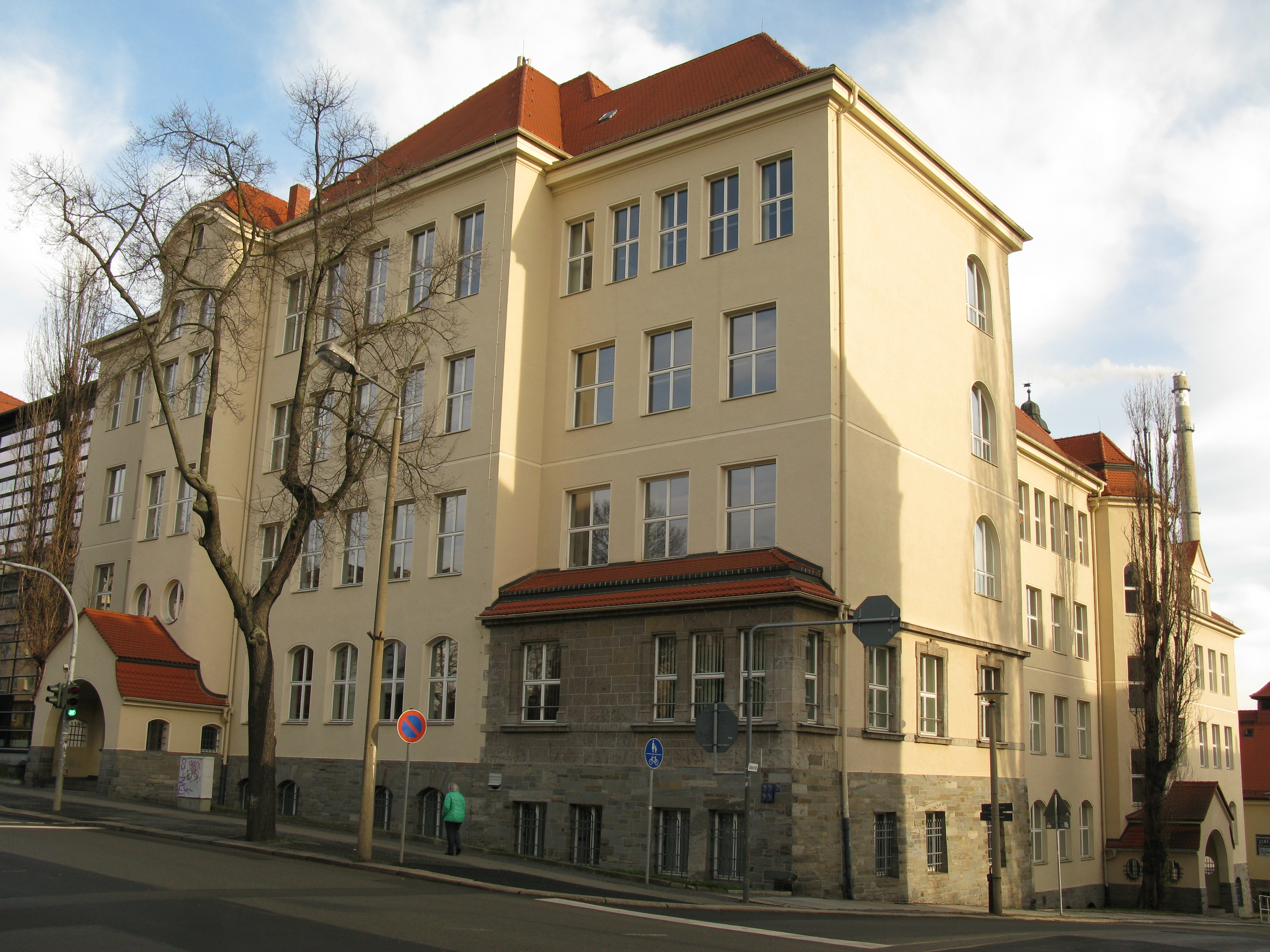 Plauen, denkmalgeschütztes Schulgebäude in der Reißiger Straße (Reißiger Straße 44). Ehemals Mosenschule, heute Bildungszentrum "Anne Frank".